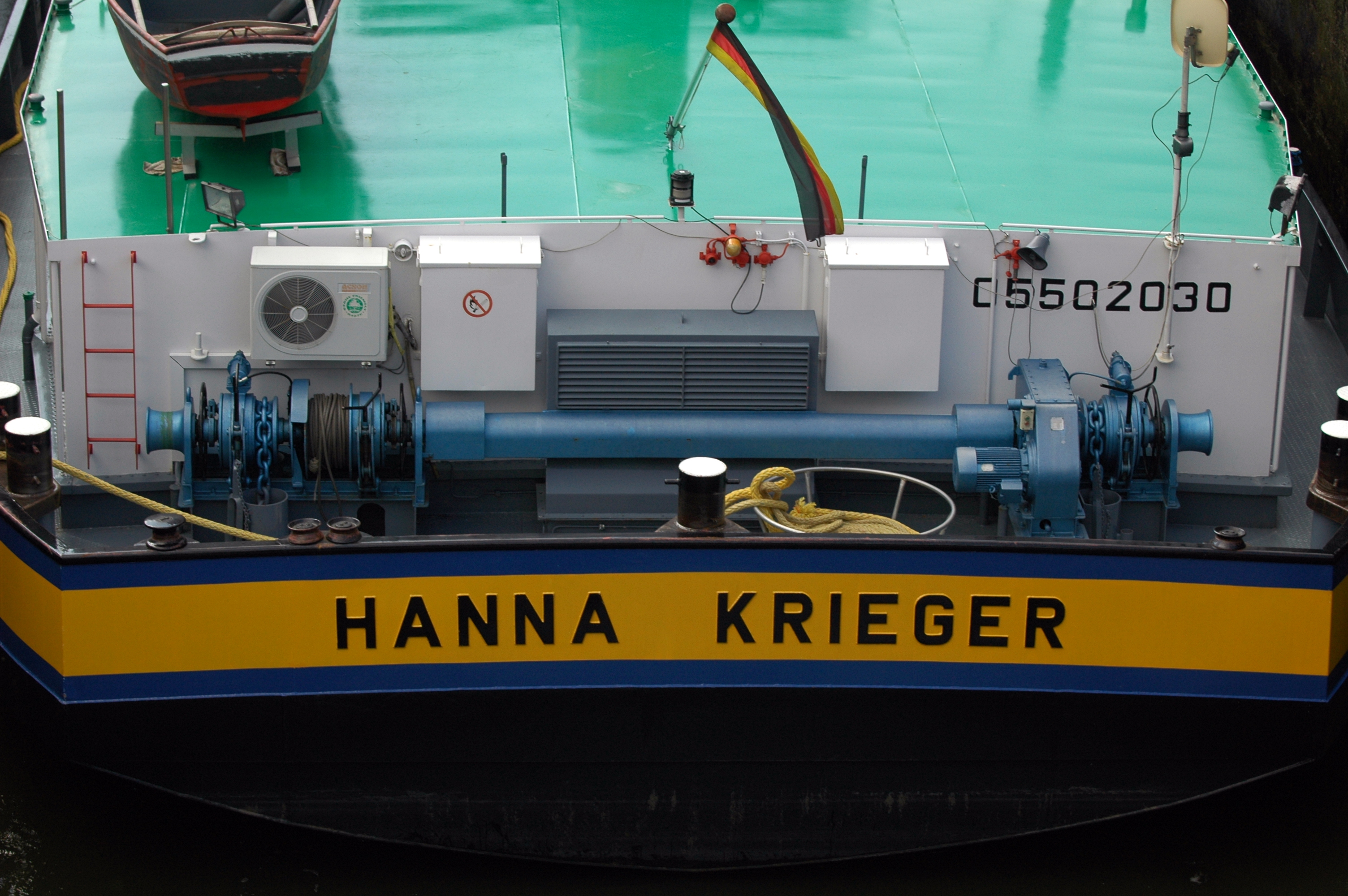 Shiff Hanna Krieger (1989)